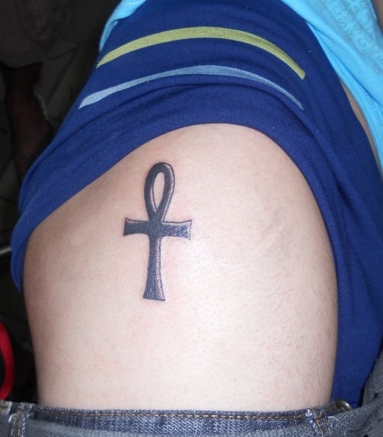 Tatuaje recien hecho